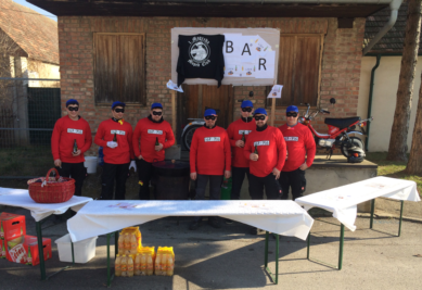 Faschingsumzug 2015